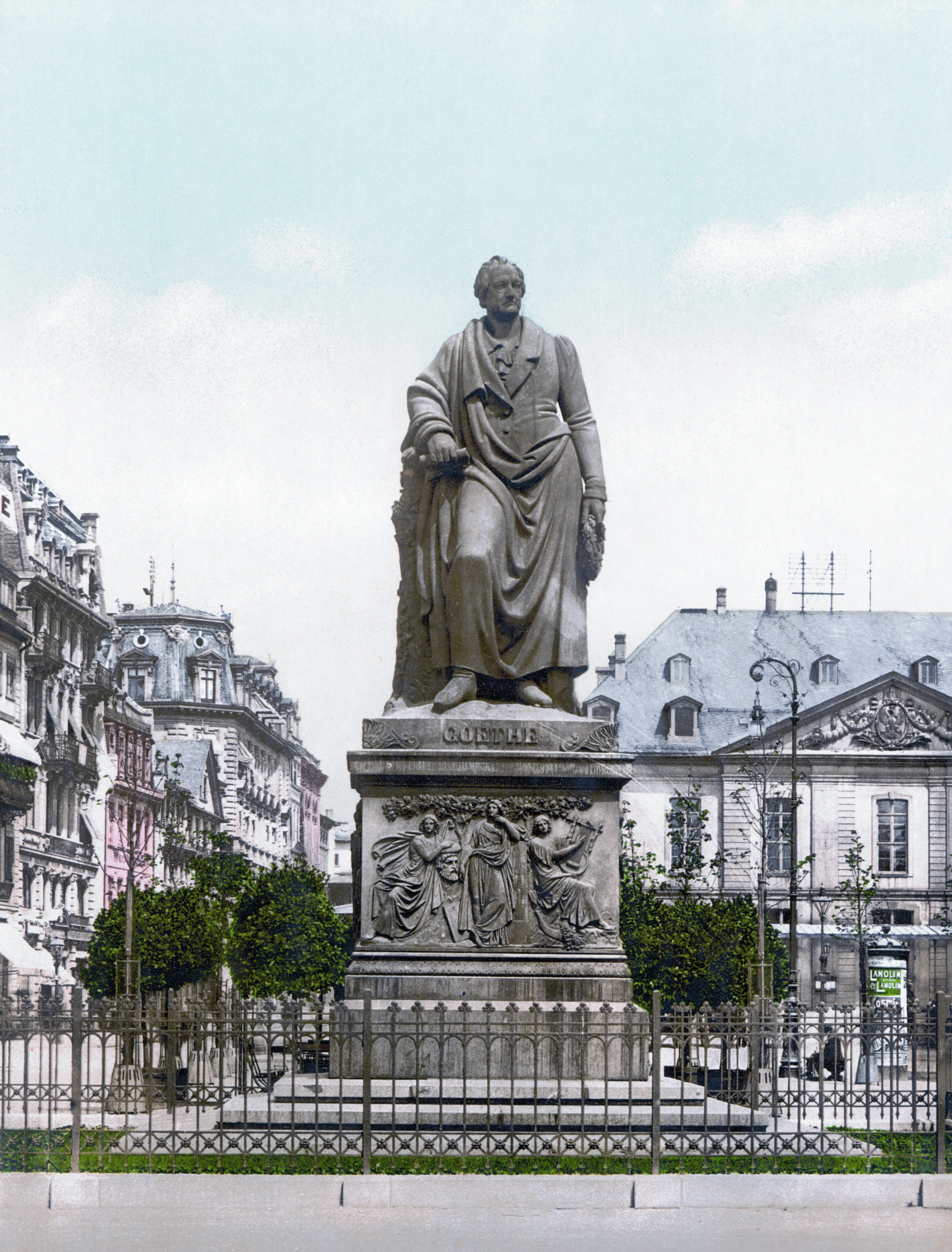 Goethedenkmal in Frankfurt von Ludwig Michael Schwanthaler